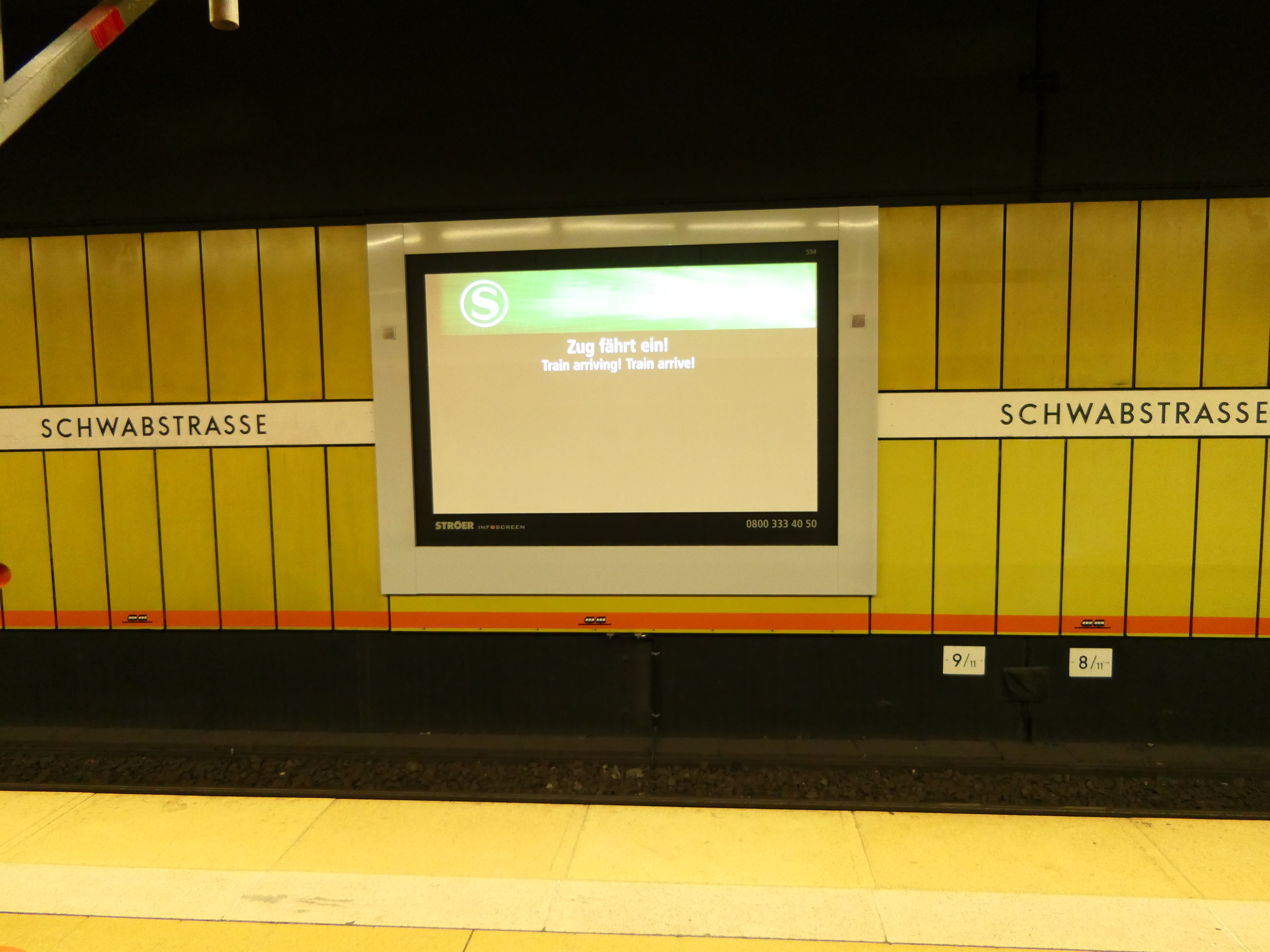 Großbildleinwand an der Bahnsteigwand am unterirdischen S-Bahnhof Schwabstraße in Stuttgart.